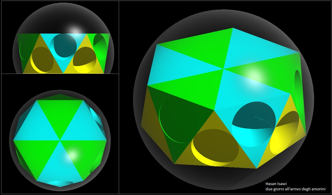 منشور مضاد سداسي- الدكتور حسن العيسوي المنشور المضاد عبارة عن متعدد وجوه حيث تتكون القاعدتين من مضلعات منتظمة بعدد (n) من الاضلاع المتساوية، وترتبط القاعدتين فيما بينها بواسطة مثلثات متساوية الأضلاع. كل مثلث منها يربط رأسين من قاعدة مع رأس واحد من القاعدة الآخرى. المنشور المضاد يشبه المنشور. ويختلف عنه في أن هناك زاوية دوران بين القاعدتين تعادل نصف الزاوية المتشكلة بين رأسين متجاورين لواحد من المضلعات ومركز الدائرة المحيطة لنفس المضلع. يعتبر المنشور المضاد متعدد وجوه محدب. وتكون وجوهه عبارة عن مضلعات برؤوس متماثلة